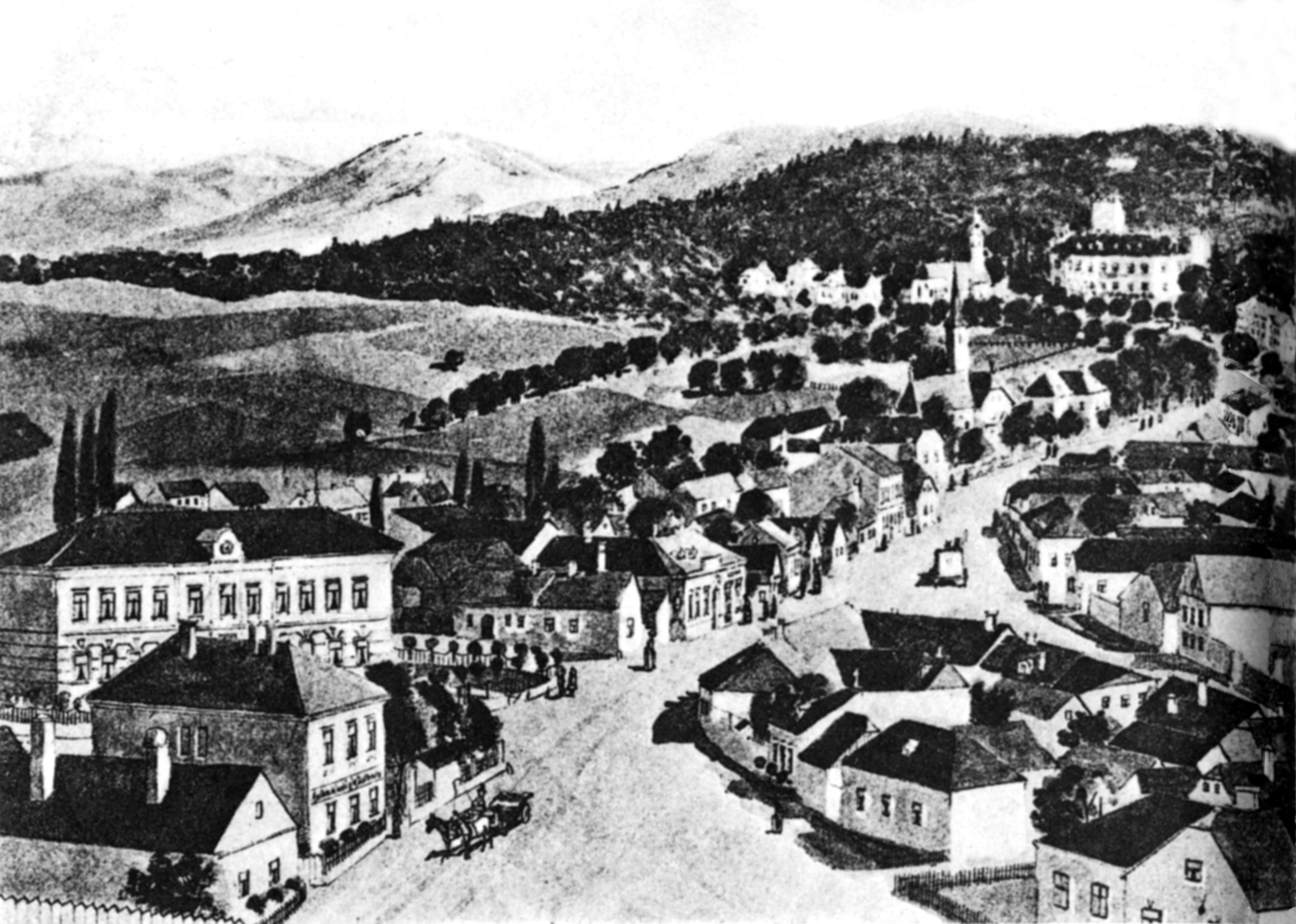 Ortsried von Enzesfeld(-Lindabrunn)